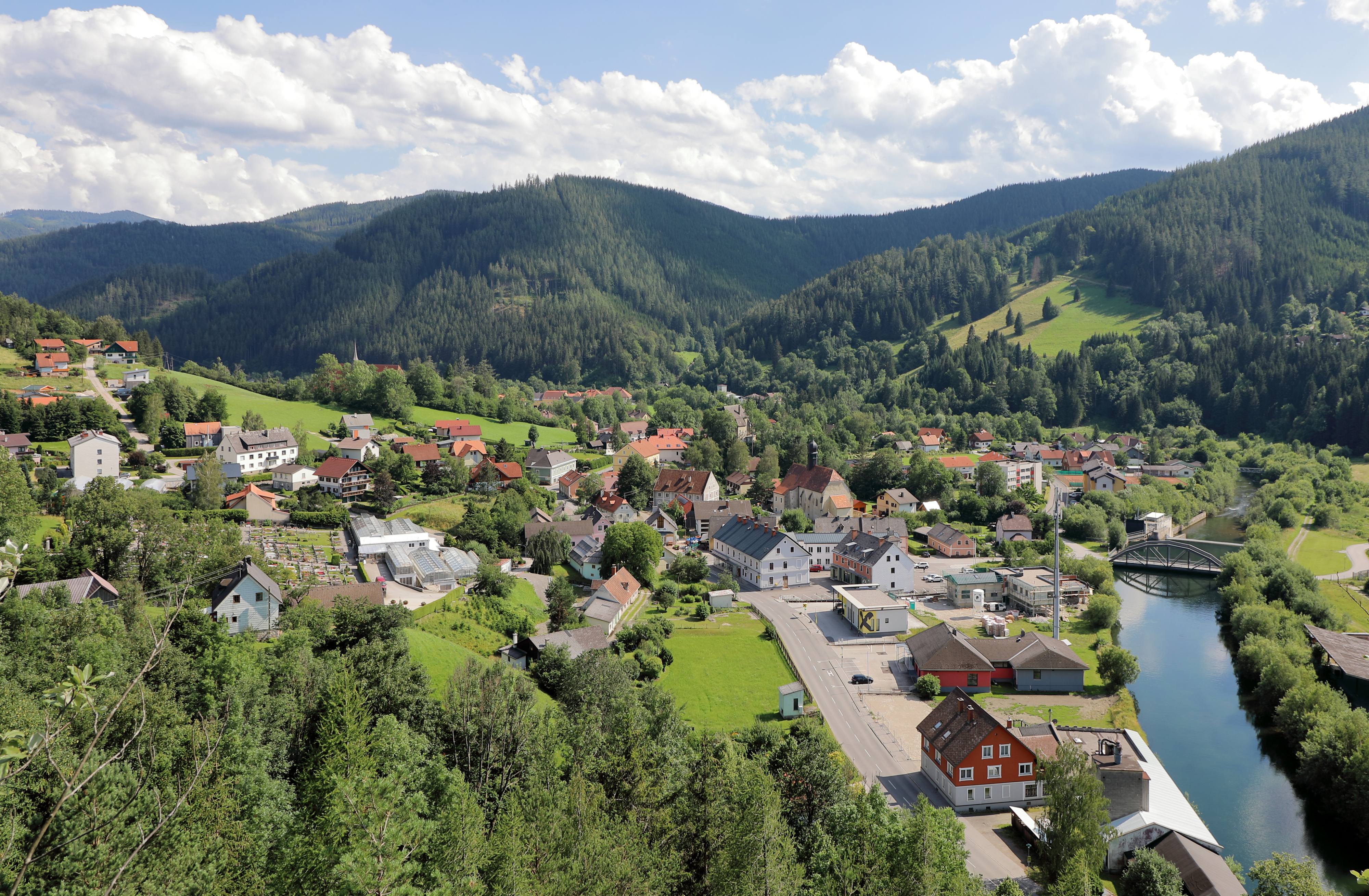 Nordansicht von Alpl, ein Ortsteil der steiermärkischen Marktgemeinde Neuberg an der Mürz. Rechts unten die Mürz und in der Bildmitte, leicht rechts, die Grünangerkirche.